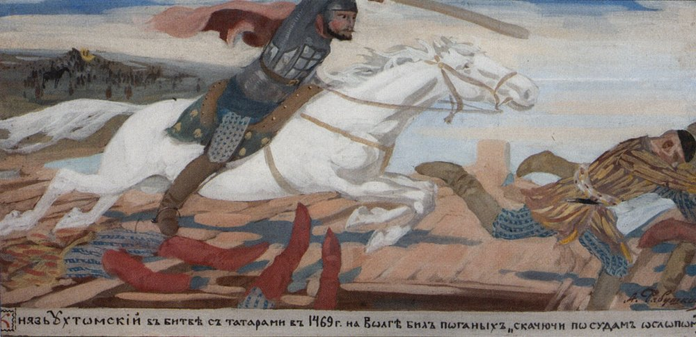 Князь Ухтомский в битве с татарами на Волге в 1469 году. 1904. Бумага, гуашь. Государственная Третьяковская галерея, Москва